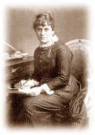 Kate Greenaway (1846-1901)